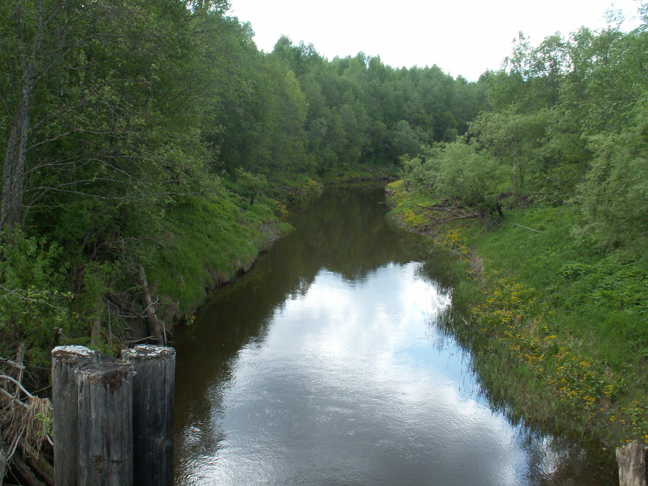 река Большая Чурга с моста по дороге Благовещенское - Шокша, конец мая, после дождя. Вода выше летнего уровня